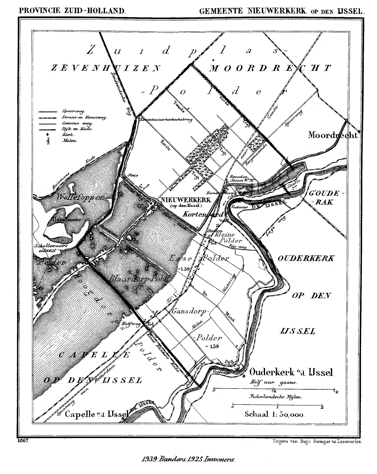 Historic map of Nieuwerkerk aan den IJssel, South Holland, the Netherlands